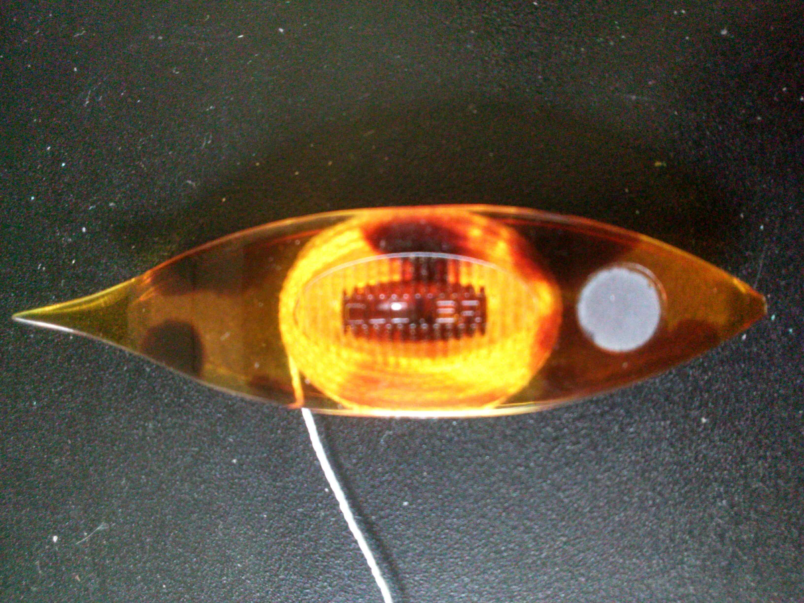 あまり糸を巻きすぎると、二枚の板の合わせ目が開いて作業中にシャトルからほどけていったり、最悪ではシャトルが壊れる原因ともなる。